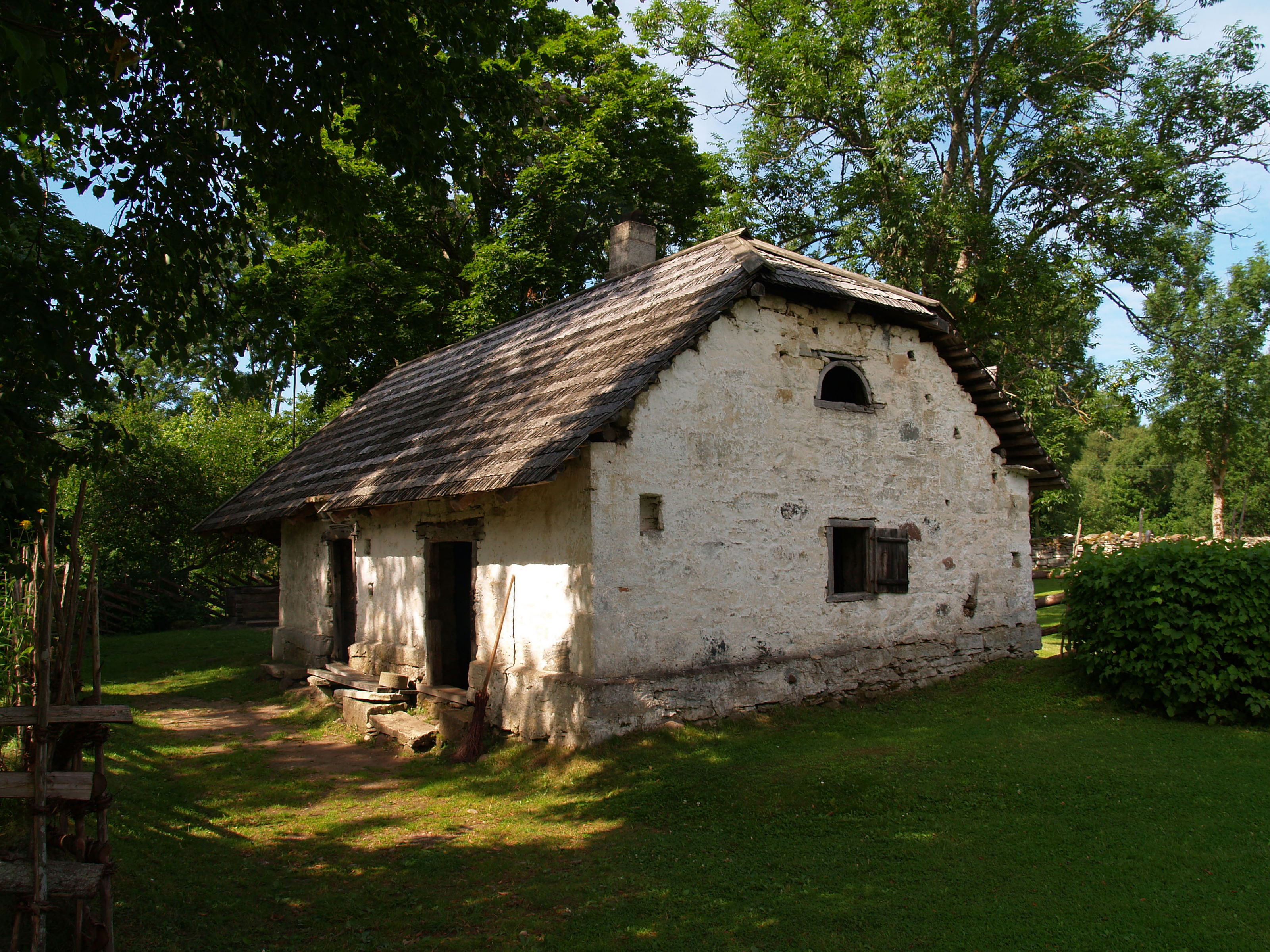 Mihkli talu sepikoda-paargu